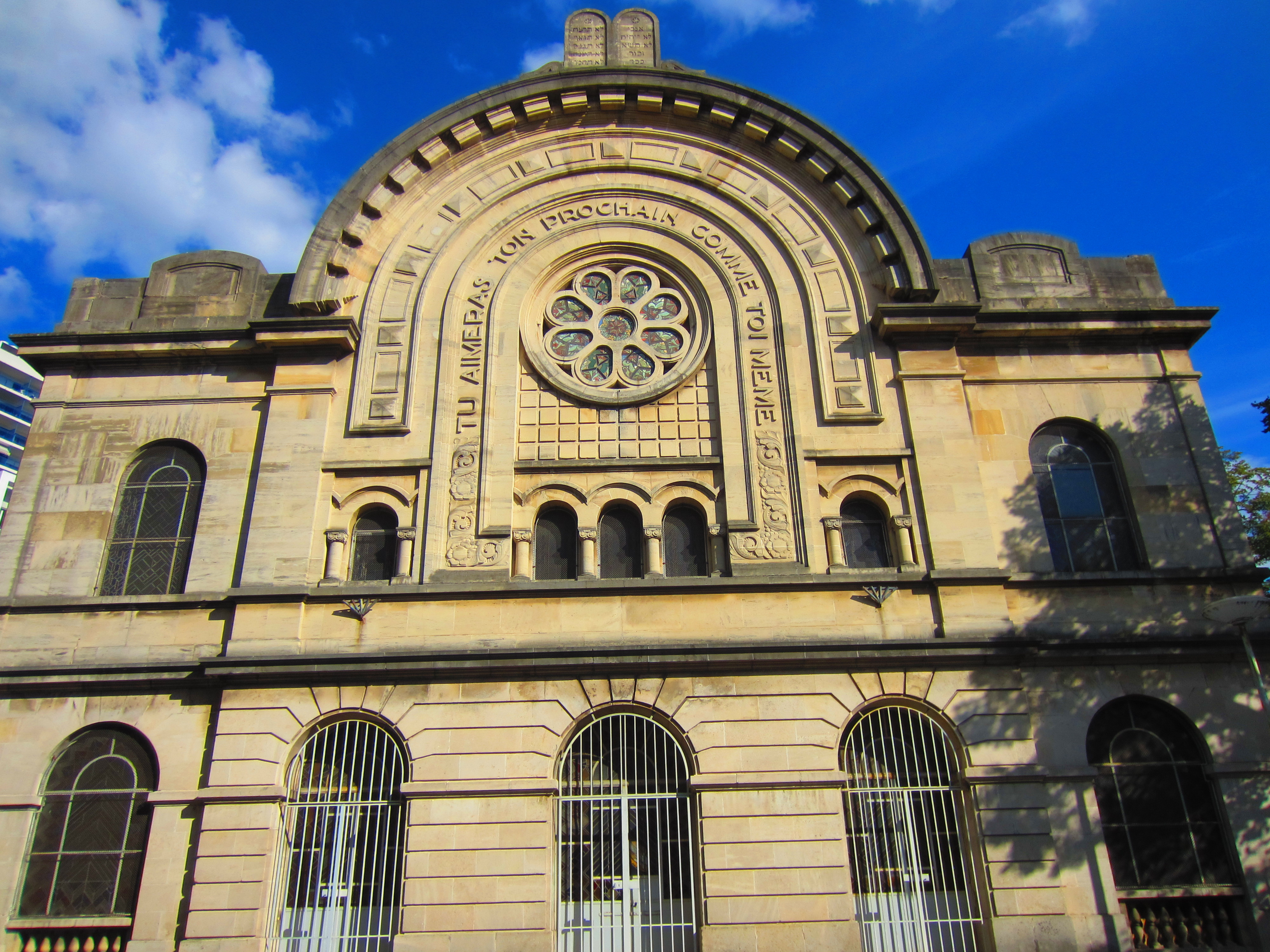 Synagogue Nancy